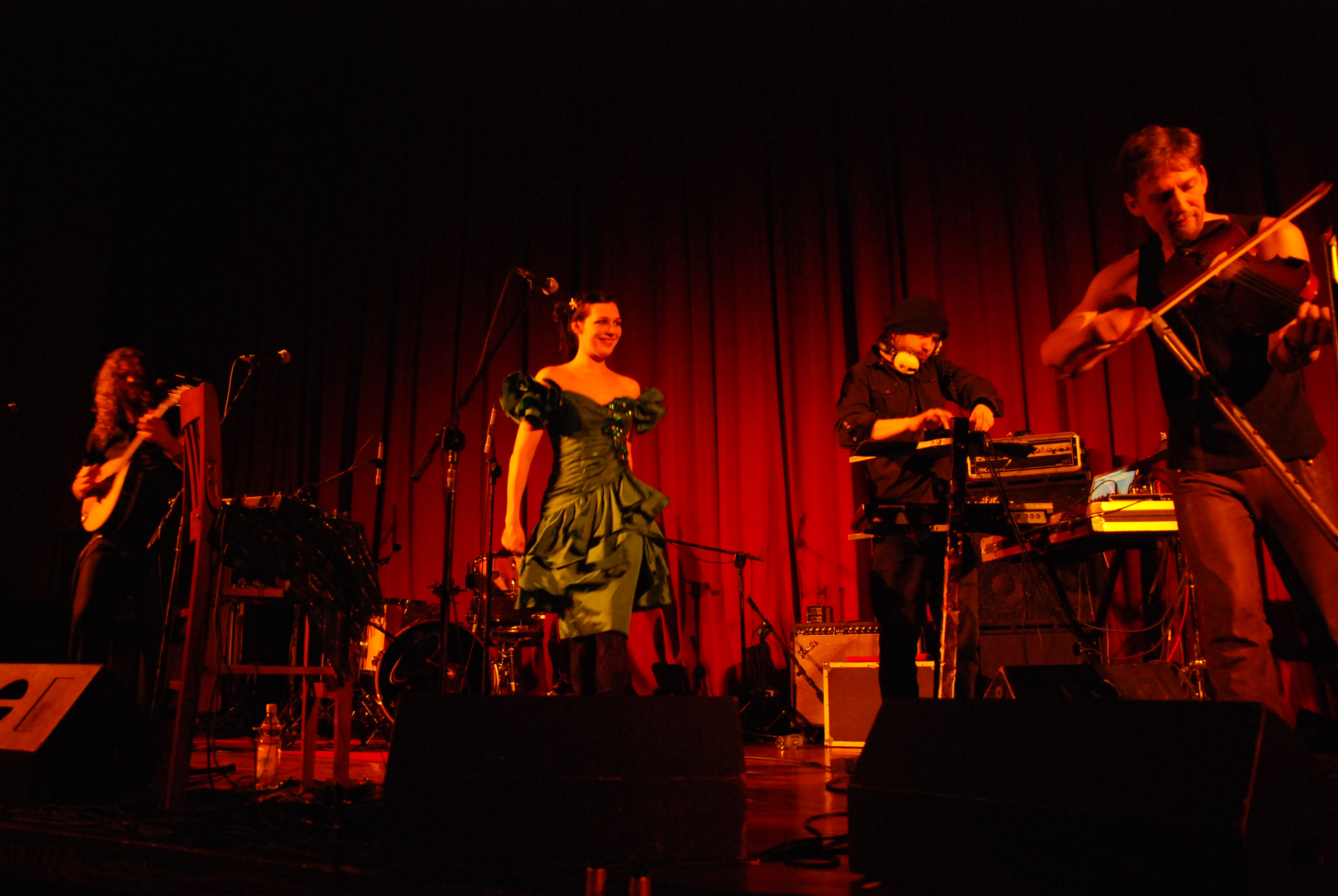 Valravn podczas Festivalu Ars Cameralis 2009 "Wieczór Muzyki Folkowej" w Kinoteatr "Rialto" w Katowicach 24.11.2009